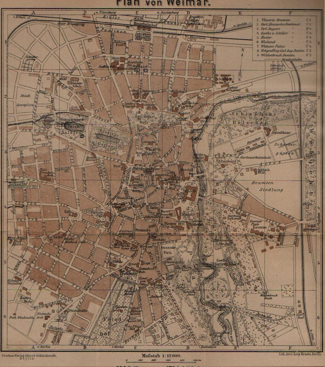 Kartenbeilage Weimar